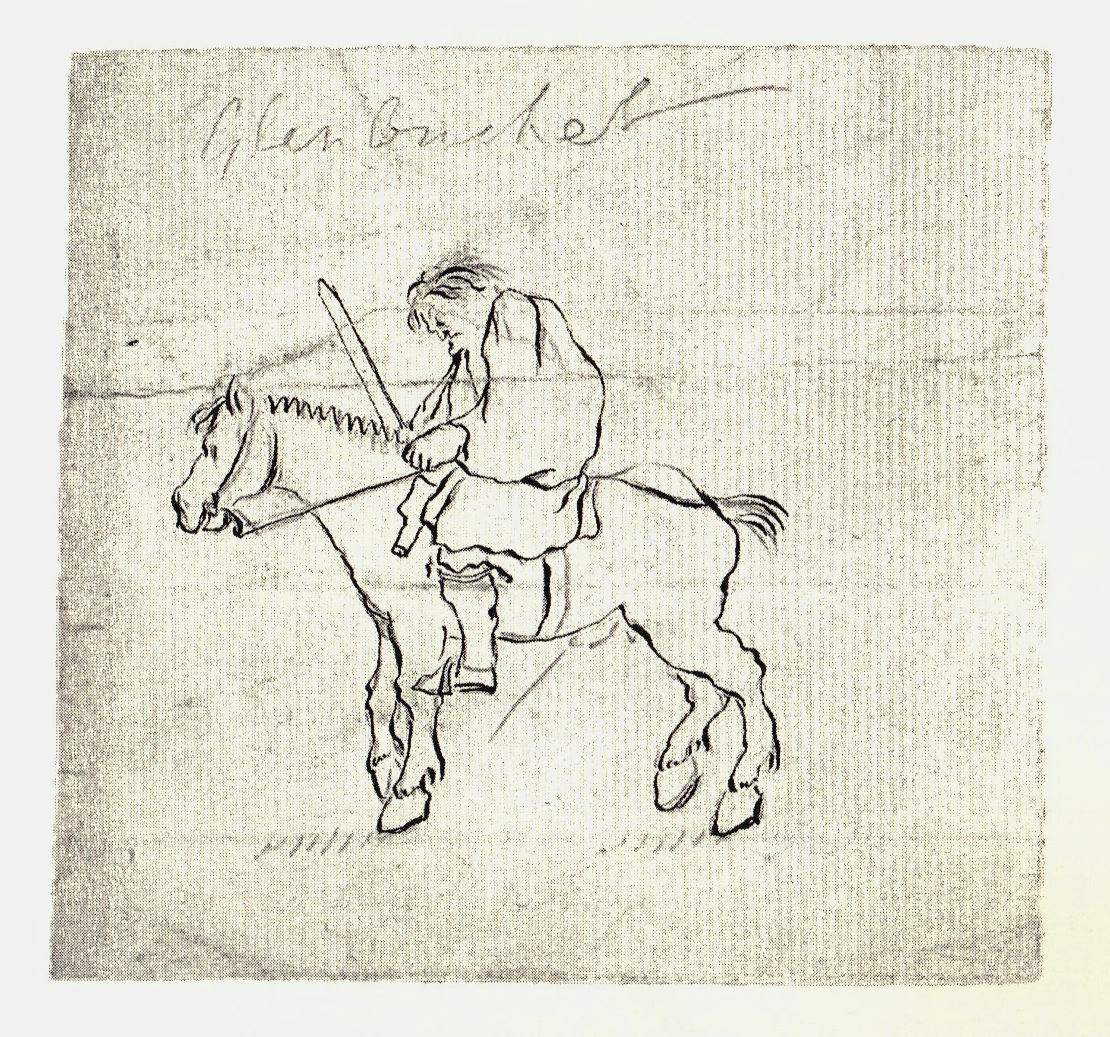 Набросок, сделанный неизвестным автором во время якобитского восстания 1745 года в Шотландии, в г. Пеникуик.